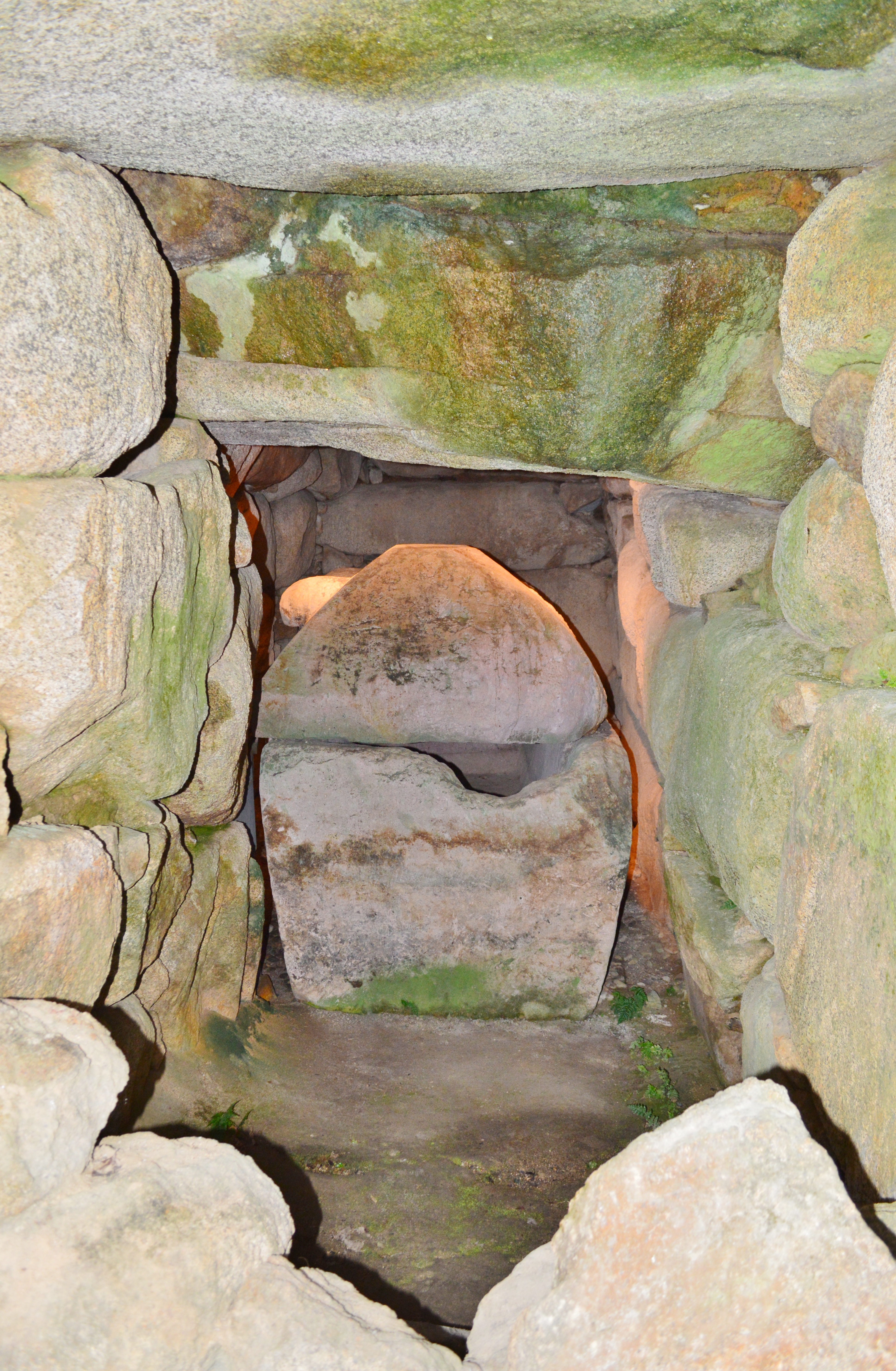 円山古墳 (野洲市) 石室玄室 Nikon D3200